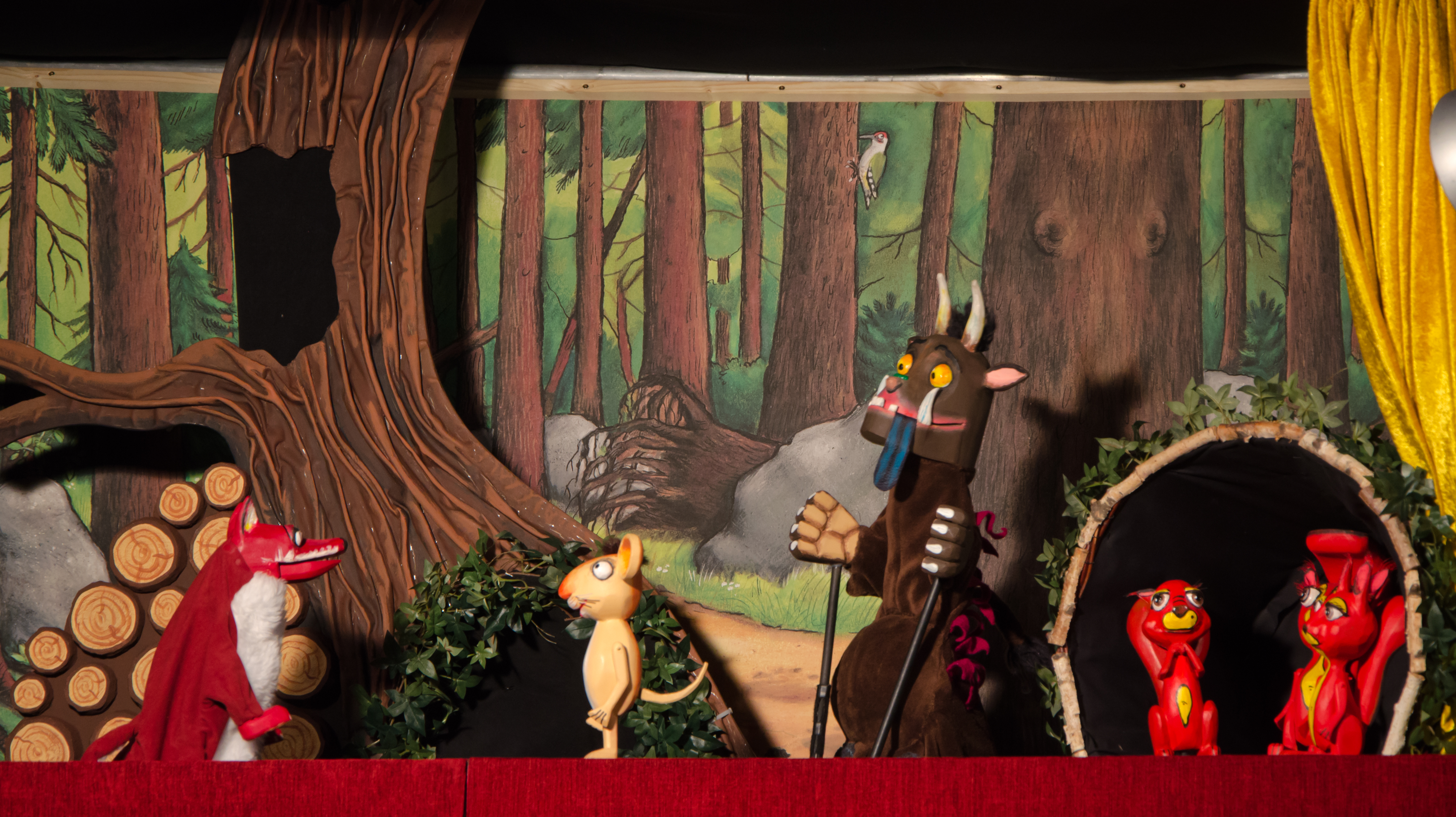 Der Grüffelo im Puppentheater